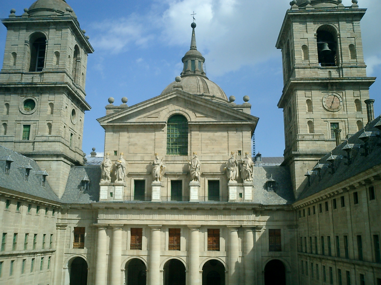 Innenhof im El Escorial mit Eingang zur Kirche